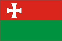 Прапор Локачинського району